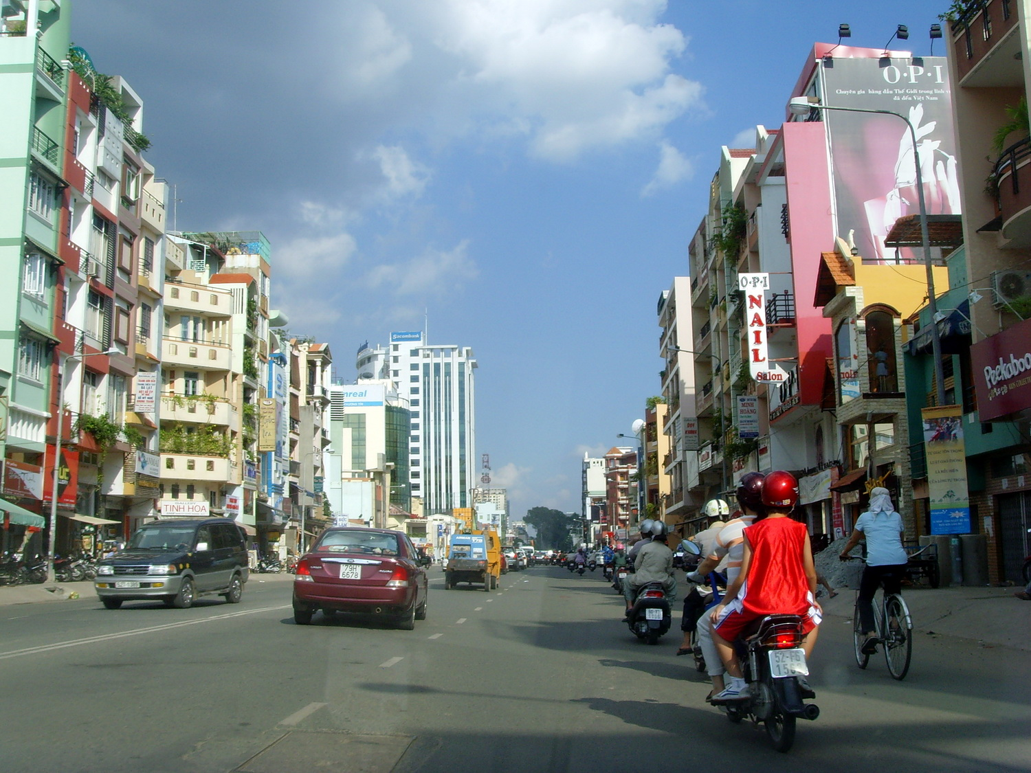 Une rue de Saigon